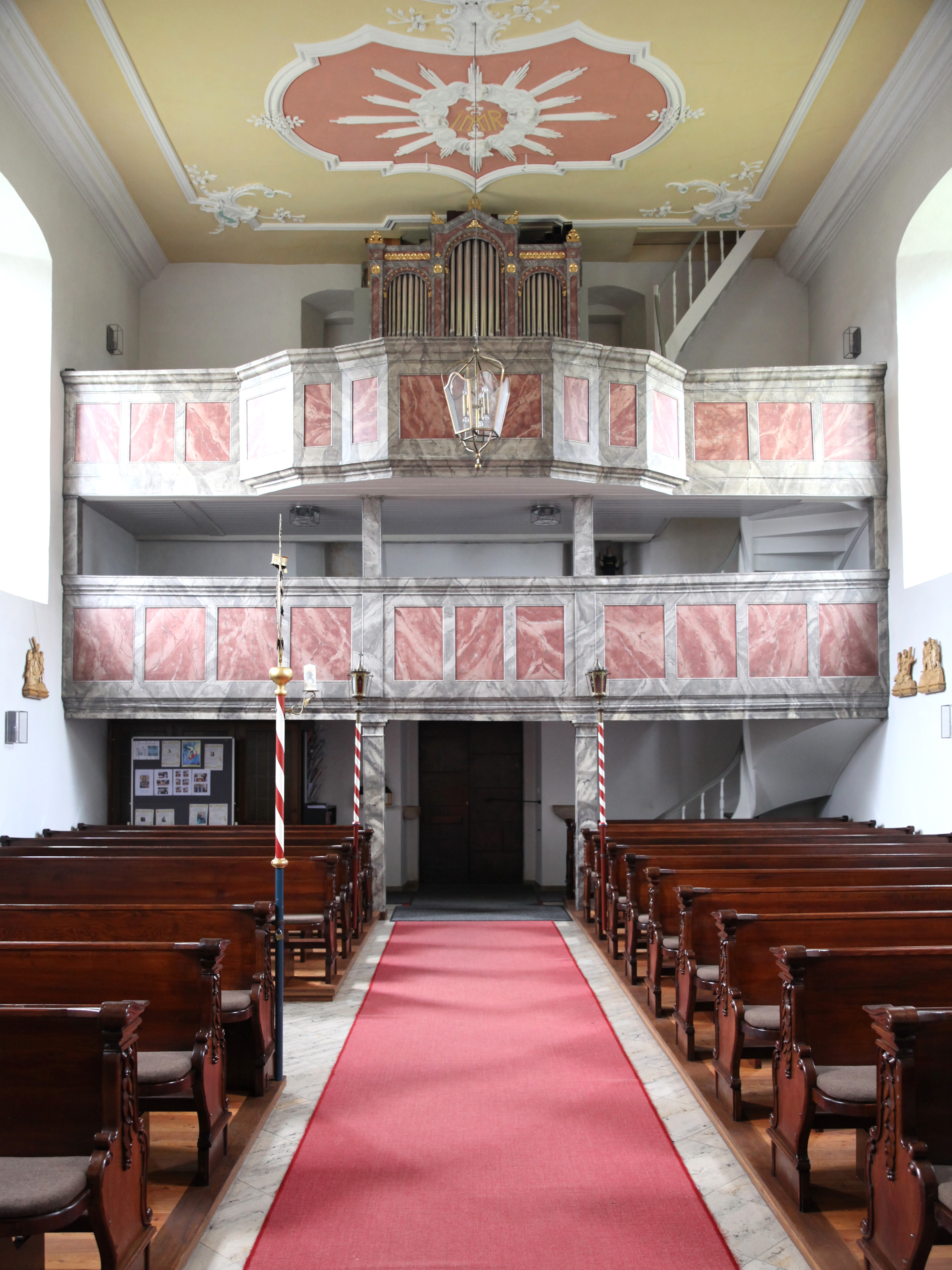 Empore, St. Johannes der Täufer, Witzmannsberg